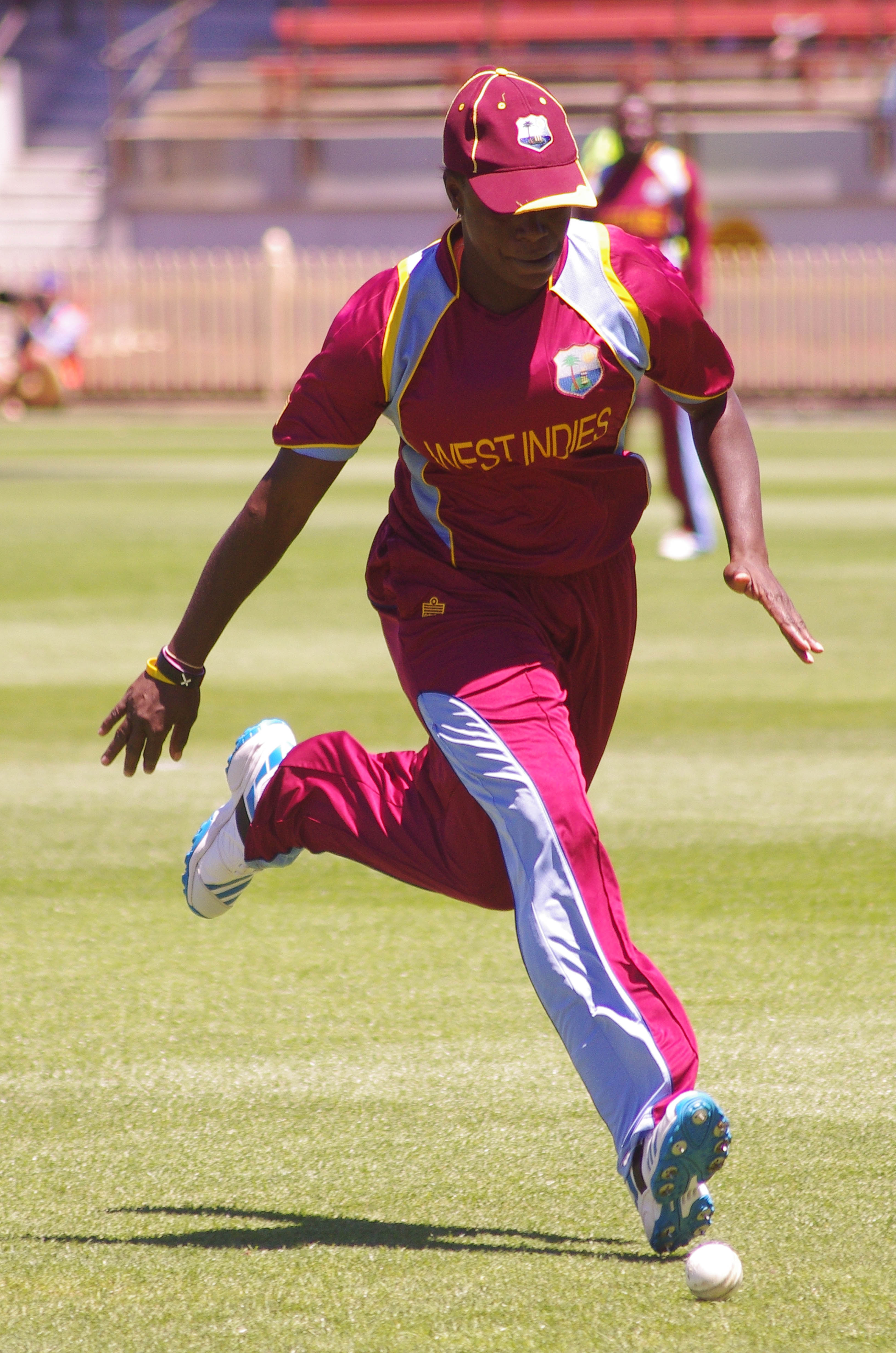 TREMAYNE SMARTT